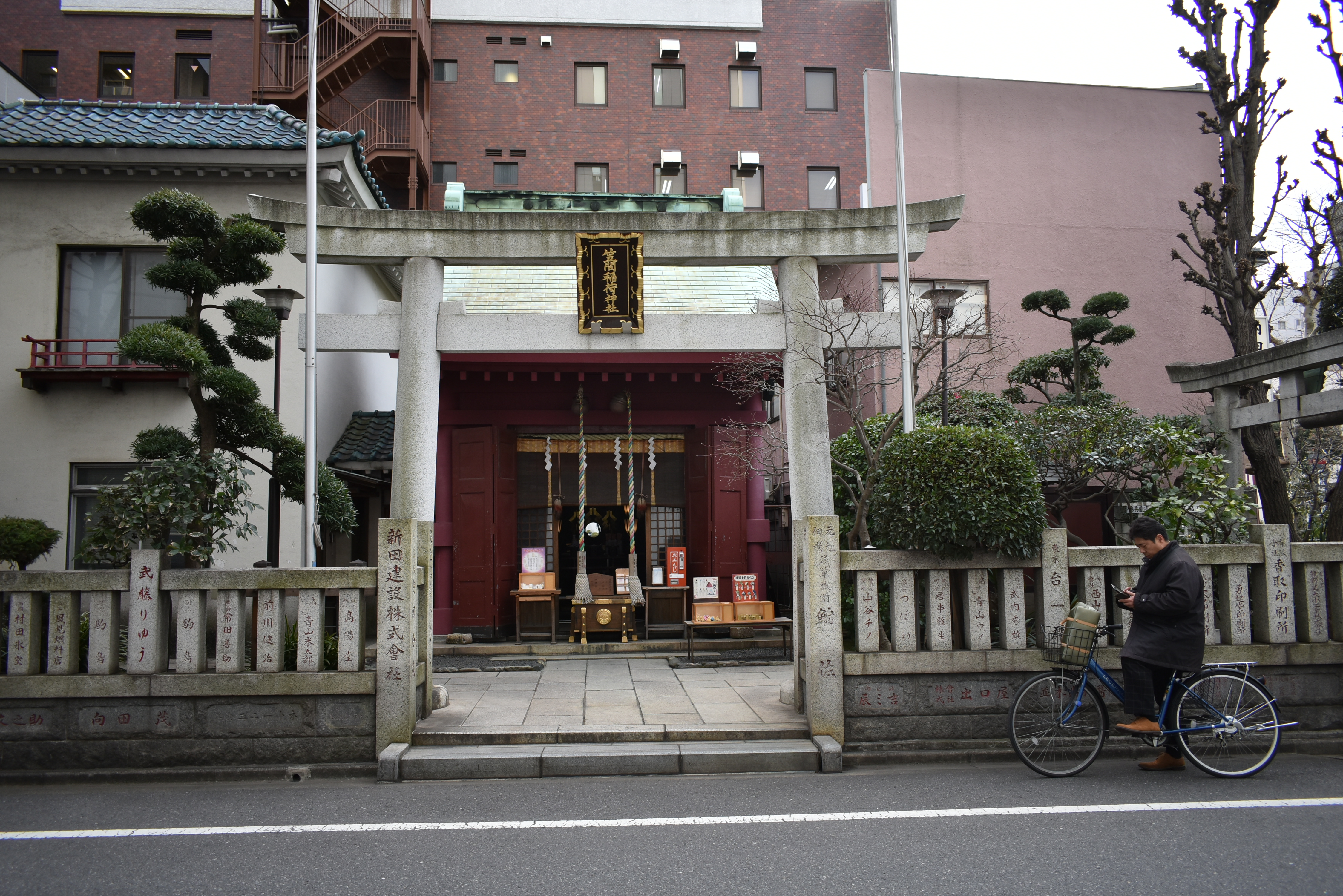 浜町 笠間稲荷神社 東京別社 Nikon D3400